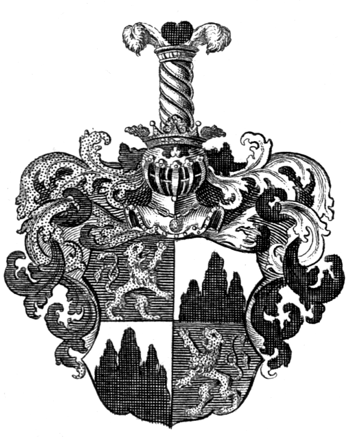 Wappen derer von Schwarzenfels, abstammend von Johann Heinrich Oberhaupt von Schwarzenfels, des 1604 geborenen und 1641 in den Reichsadelsstand nobilitierten, unehelichen Sohnes des 1638 verstorbenen regierenden Reichs-Grafen Anton Heinrich von Schwarzburg und Hohnstein zu Sondershausen.